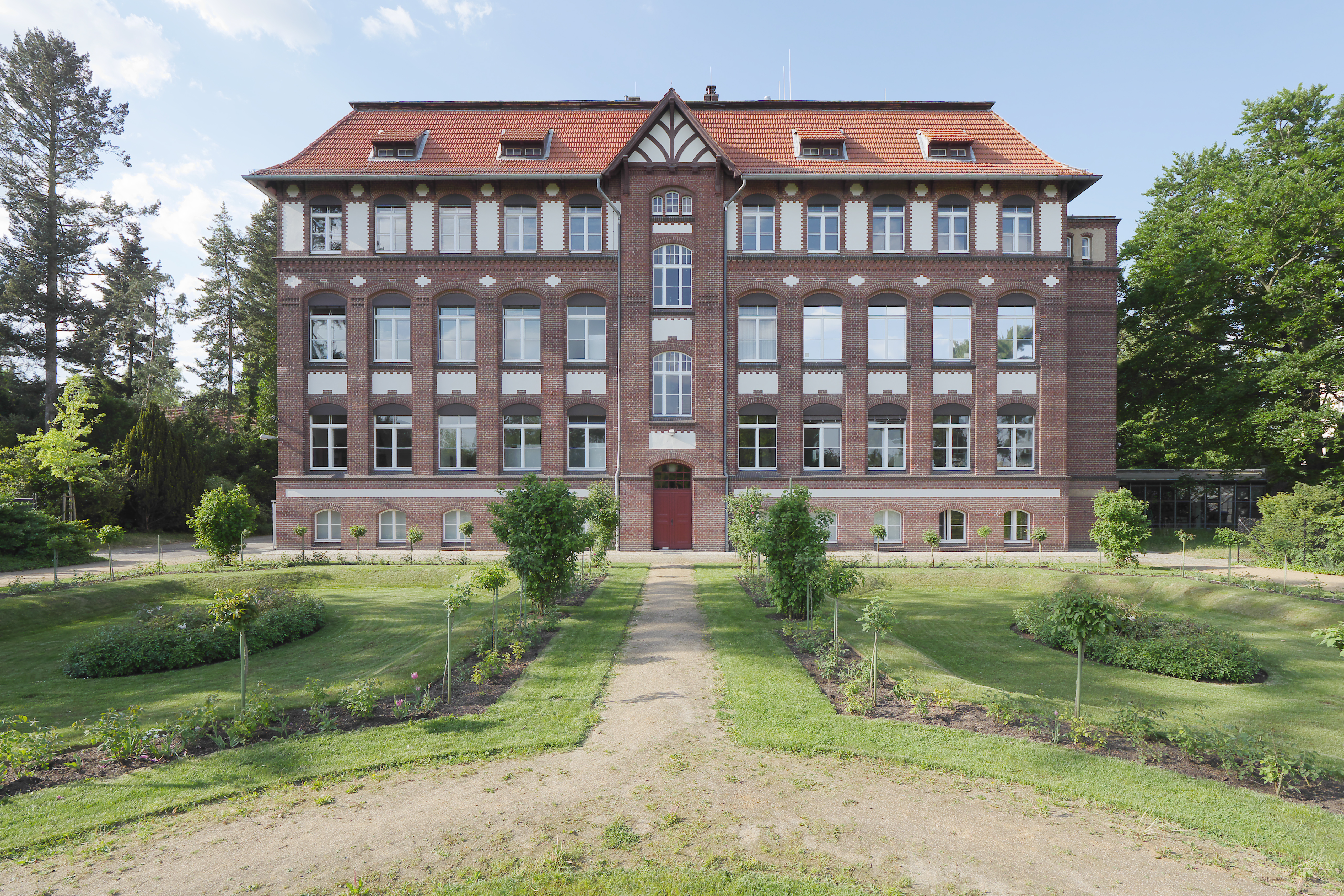 Institut für Lebensmitteltechnologie und Lebensmittelchemie TU Berlin (Dahlem), Königin-Luise-Straße 22, Ansicht des Altbaus vom Rosengarten der wiederhergestellten Schaugärten